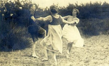 Tanzende Wandervogel, Postkarte